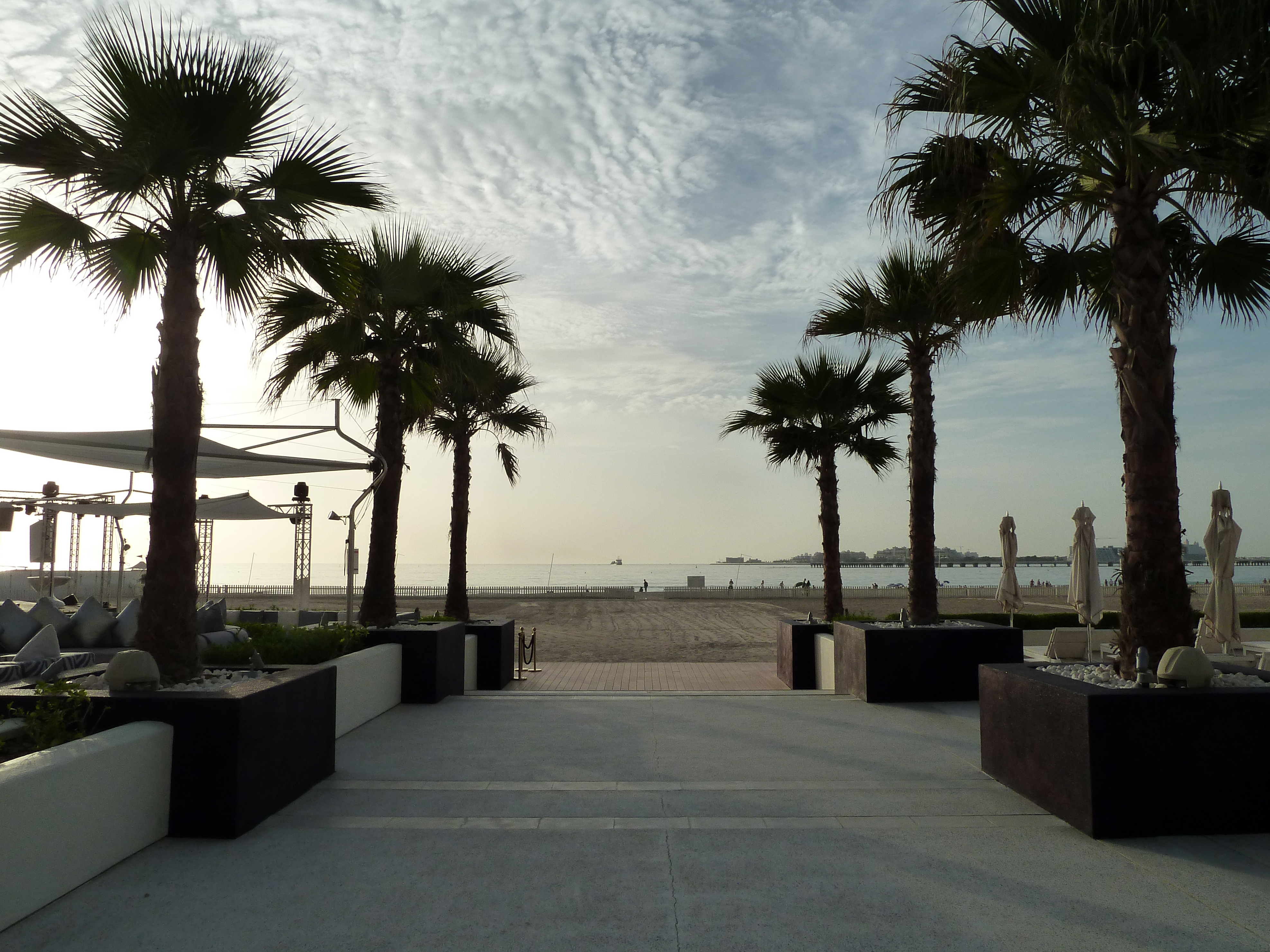 Meydan Beach Club, Dubai